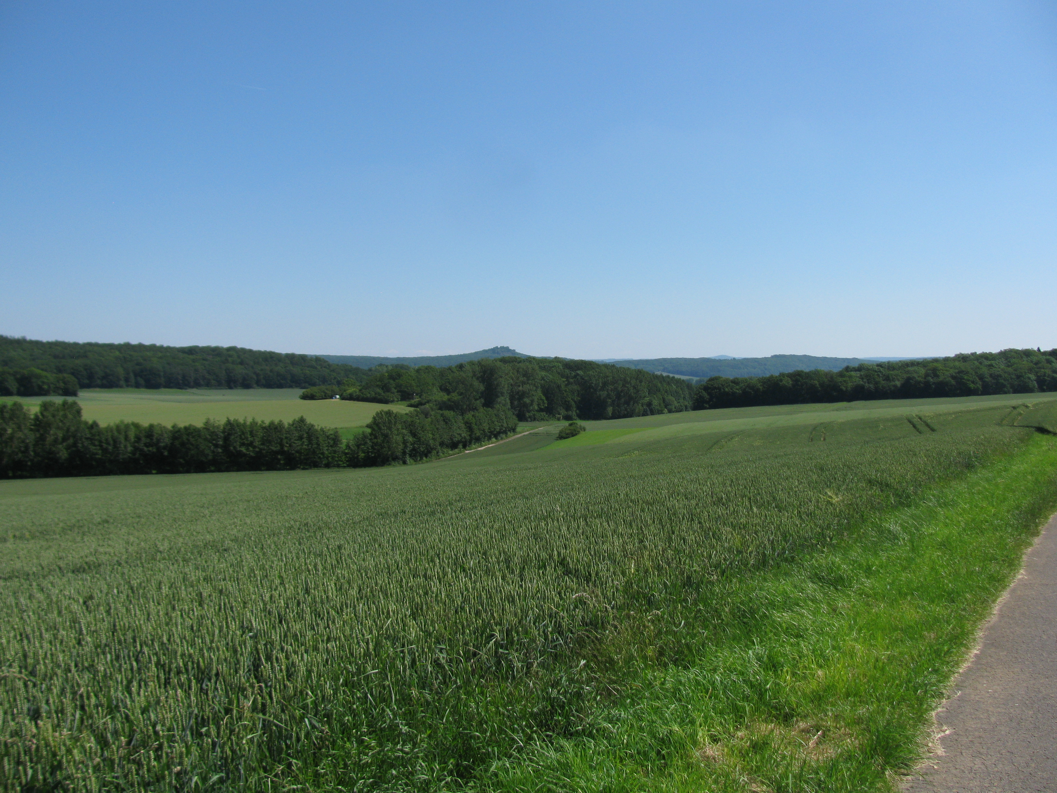 das Tal des Ruhrbach zwischen Niederlistingen und Niedermeiser